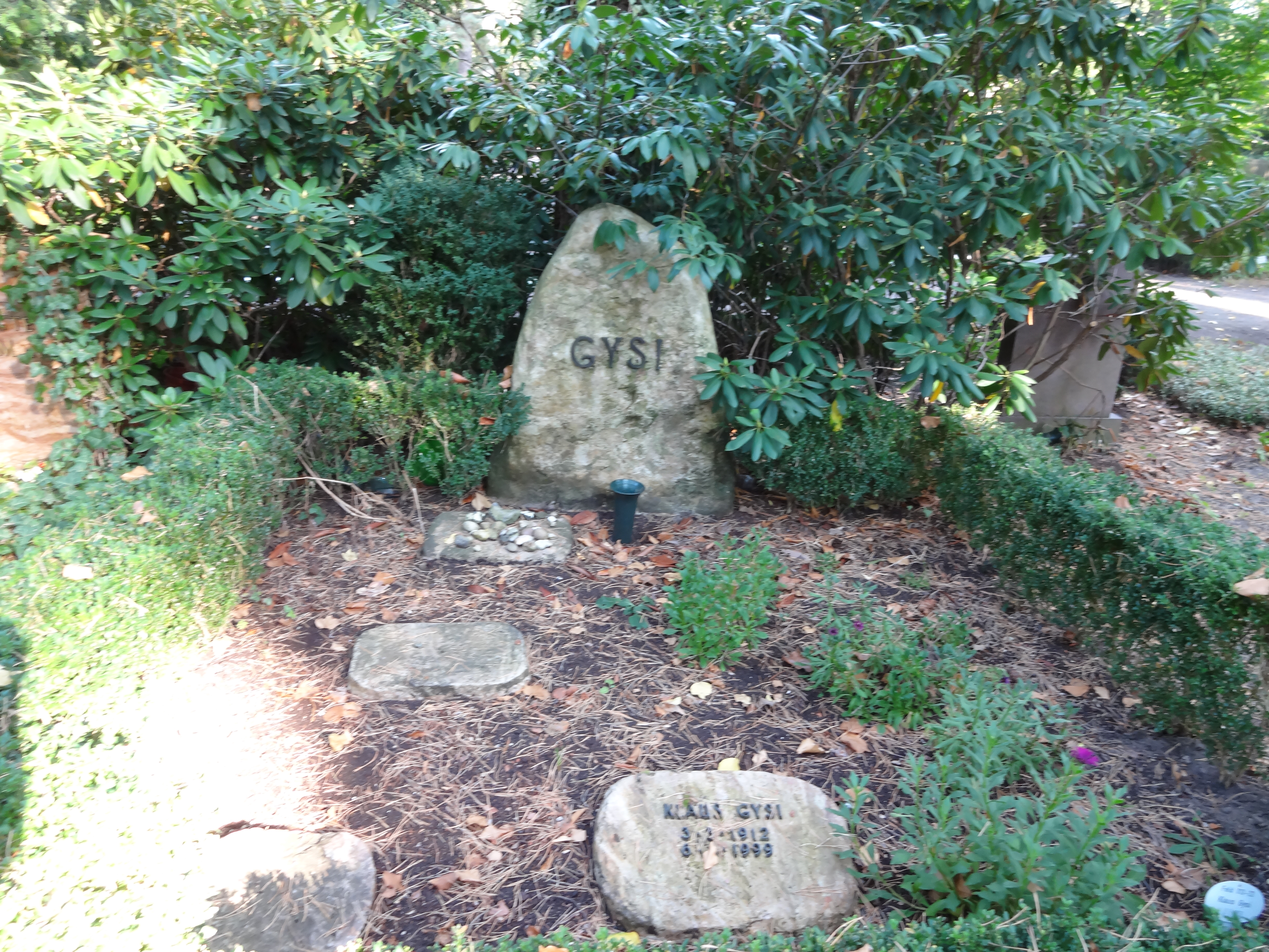 Grab von Klaus Gysi auf dem Waldfriedhof Dahlem